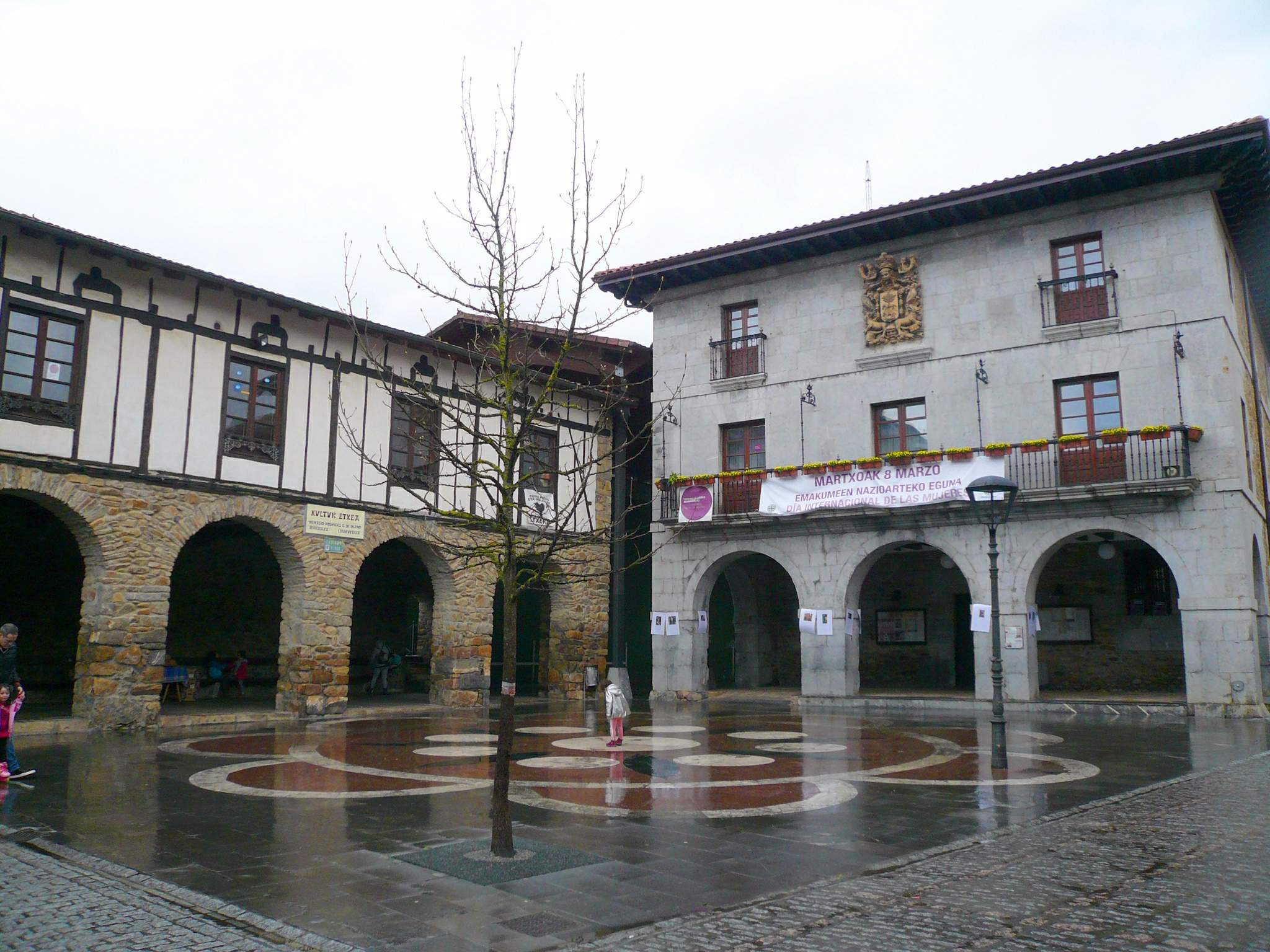 Ayuntamiento de Orozko, en el barrio de Zubiaur (Vizcaya)